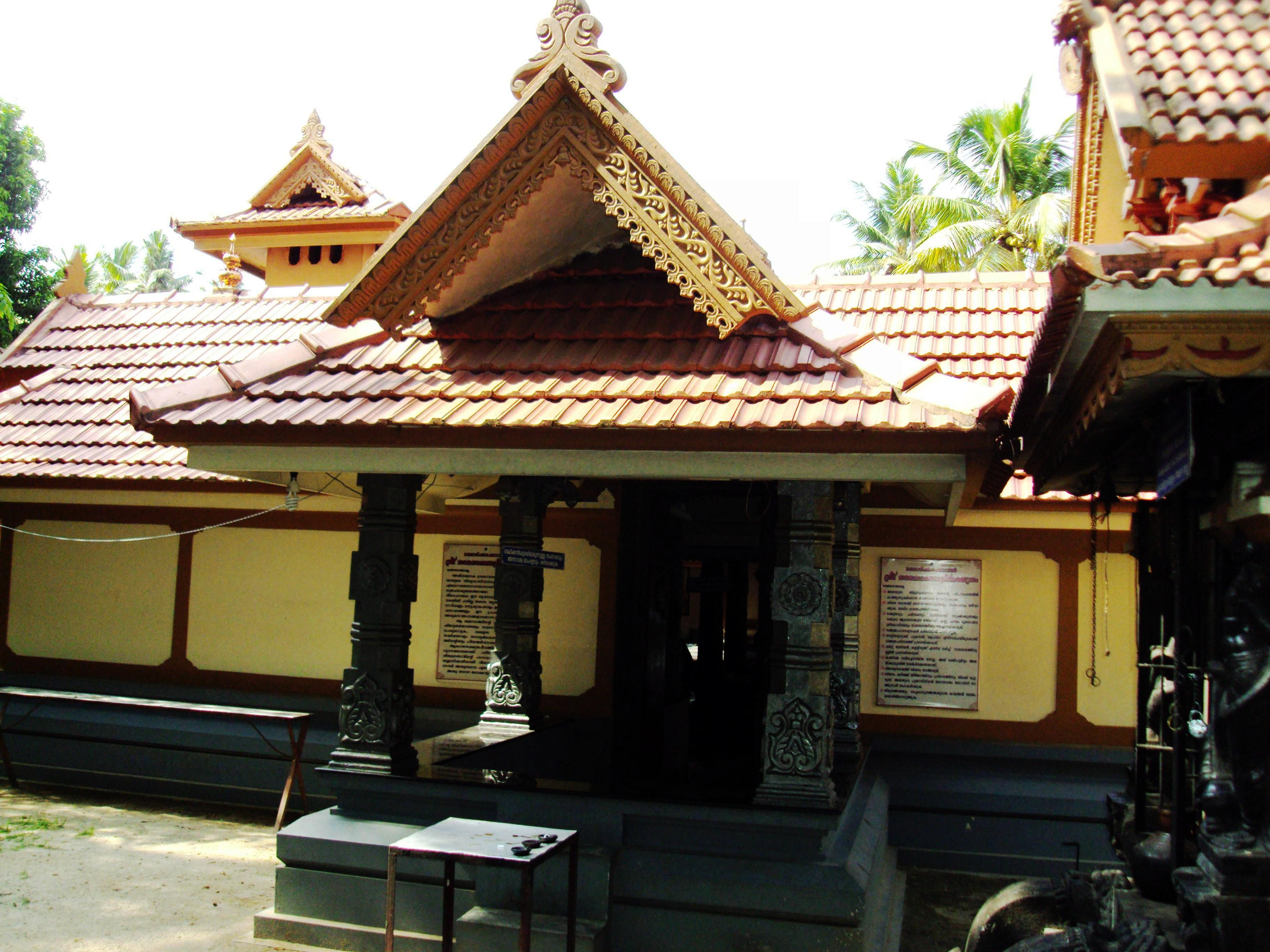 മഞ്ചാടിക്കരകാവിൽ ക്ഷേത്രം